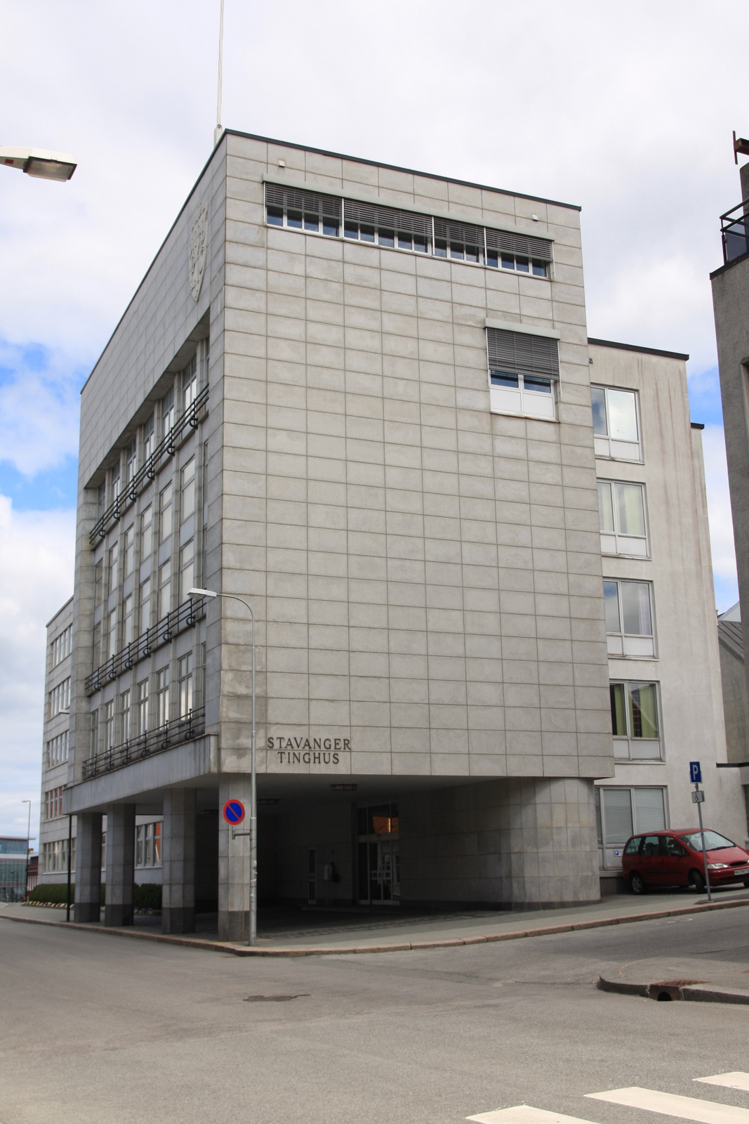 Stavanger tingrett sine lokaler i Stavanger